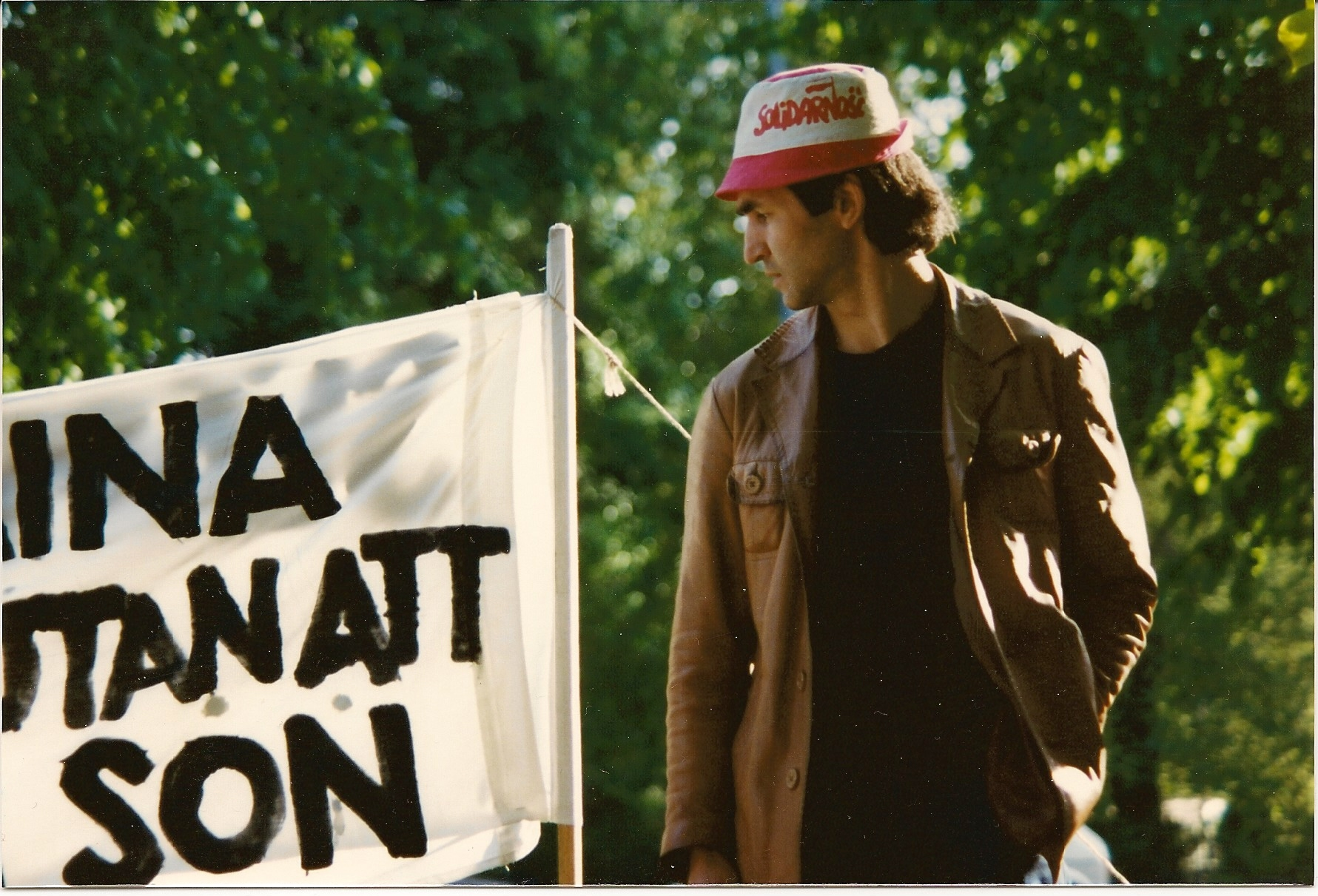 Tomasz Strzyżewski, głodówka w Sztokholmie